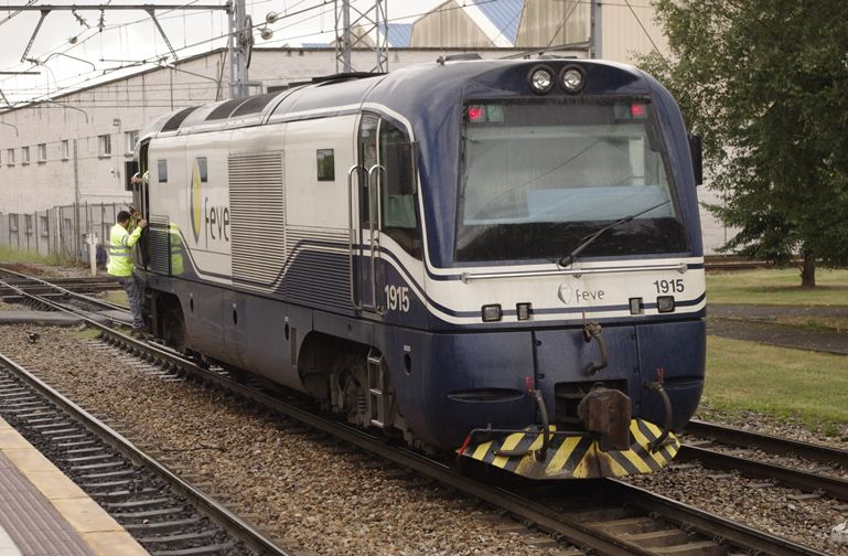 Serie 1915 de FEVE